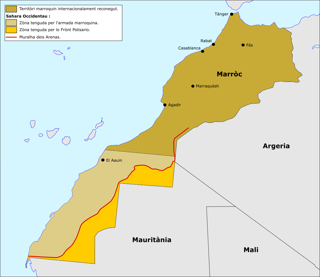 Partiment dau Sahara Occidentau après l'alta-au-fuòc de 1991.